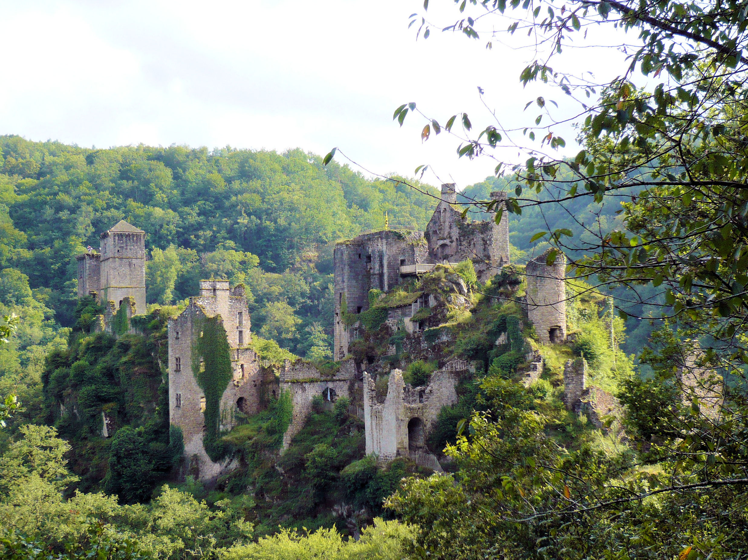 Les Tours de Merle (France)